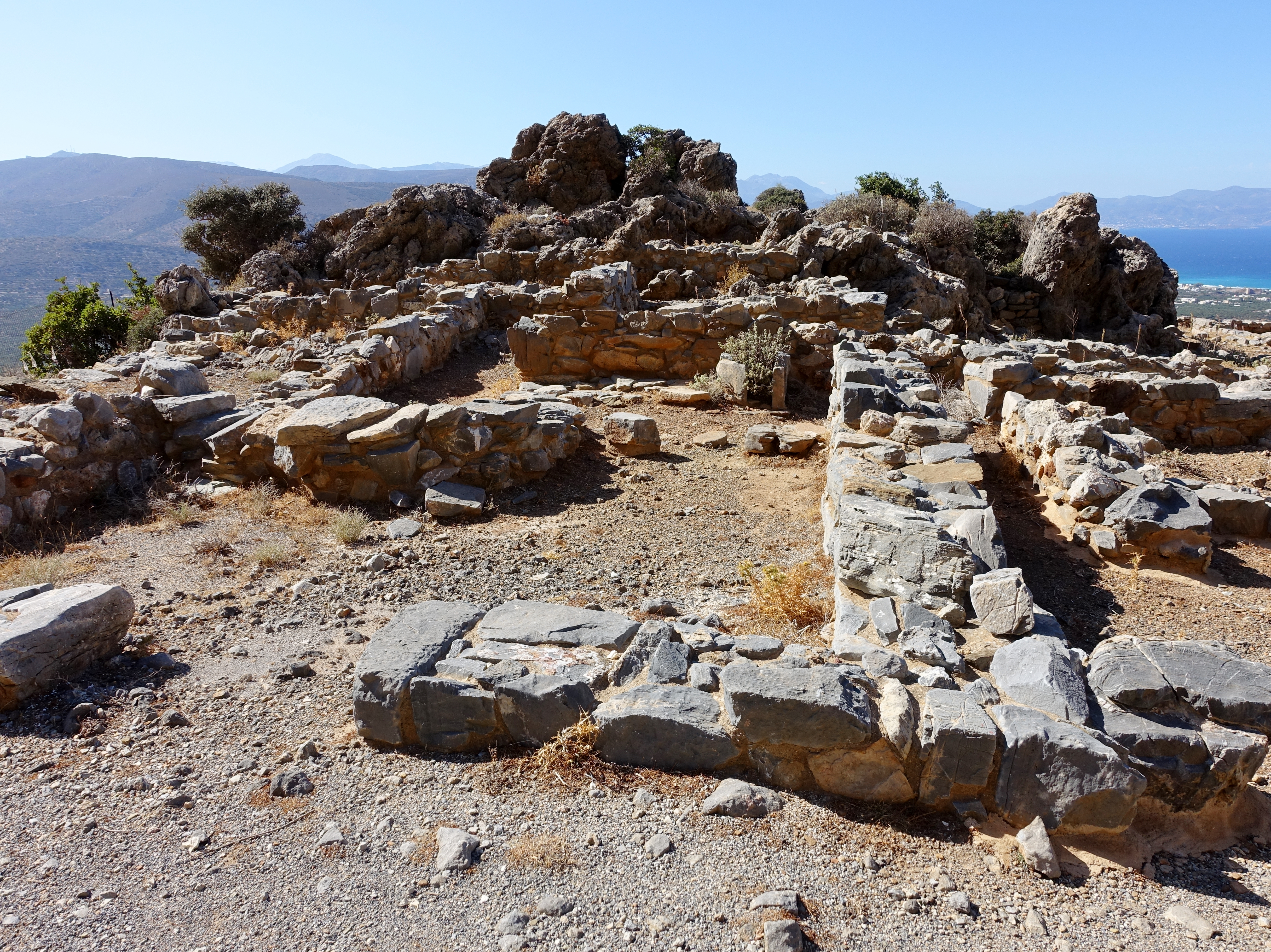 Ausgrabungsstätte von Chalasmenos (Χαλασμένος) bei Monastiraki, Kreta, Griechenland